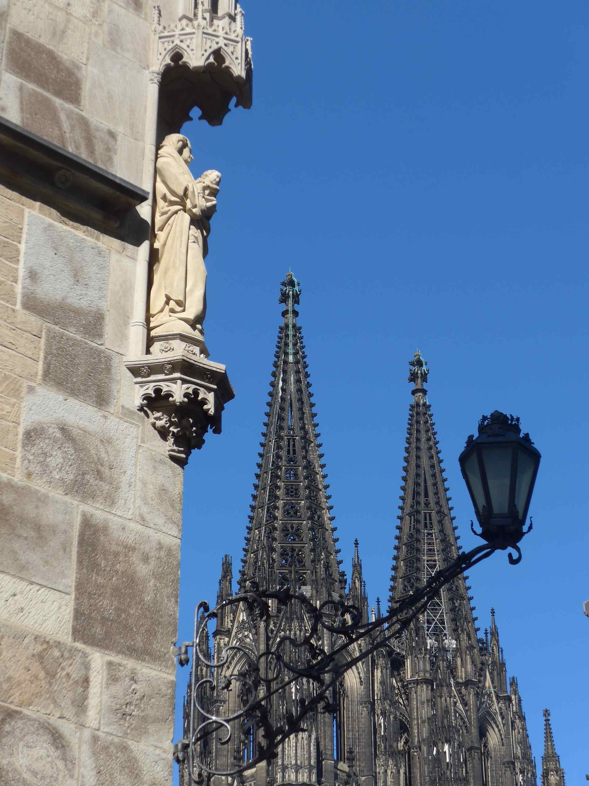 Haus Saaleck, Am Hof 50, Marienbild mit historischer Ecklaterne This is a photograph of an architectural monument.